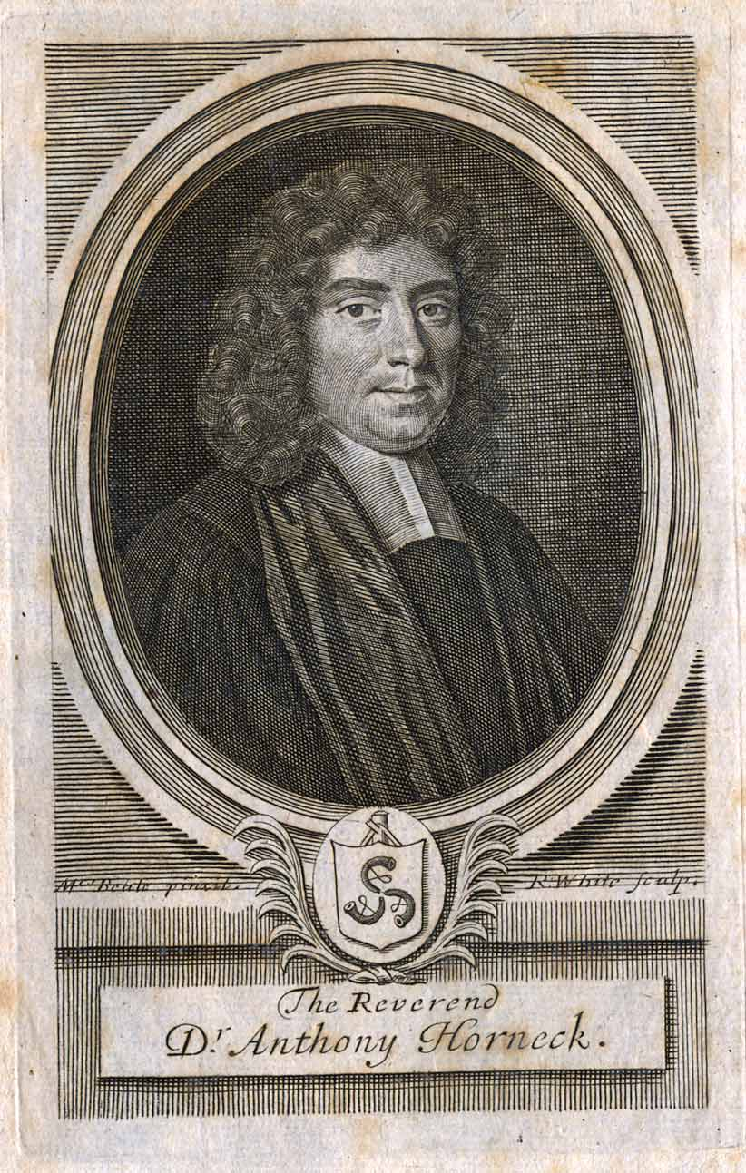 1 grafiskt blad, kopparstick Kopparstick föreställande Anthony Horneck (1641-1697), präst. Konstnär: R. White